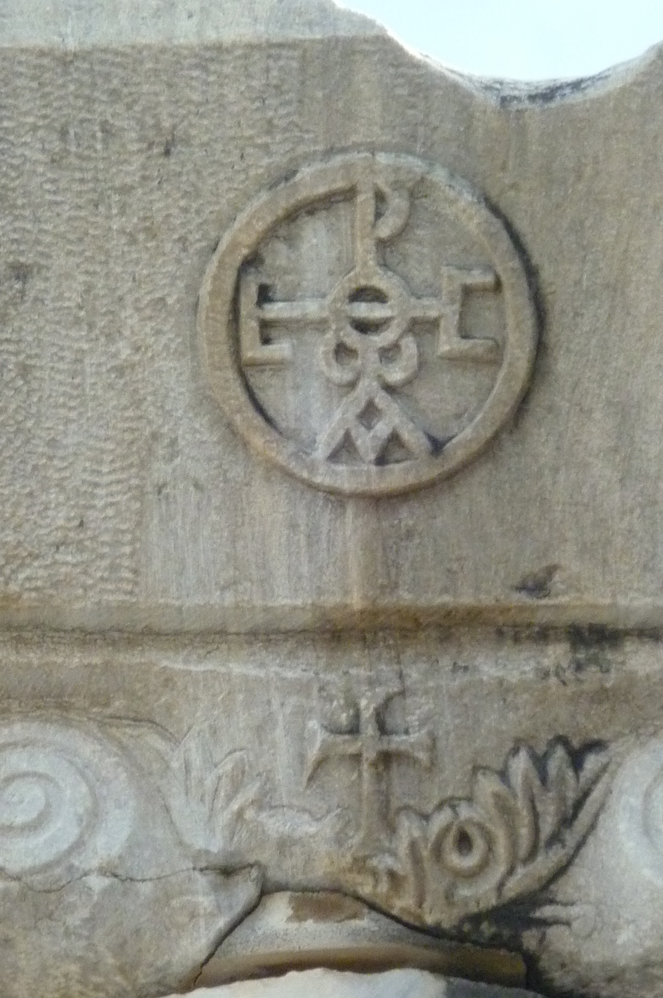 Monogramm der Theodora I. auf einem Kapitell der Johanneskirche (Ephesos)